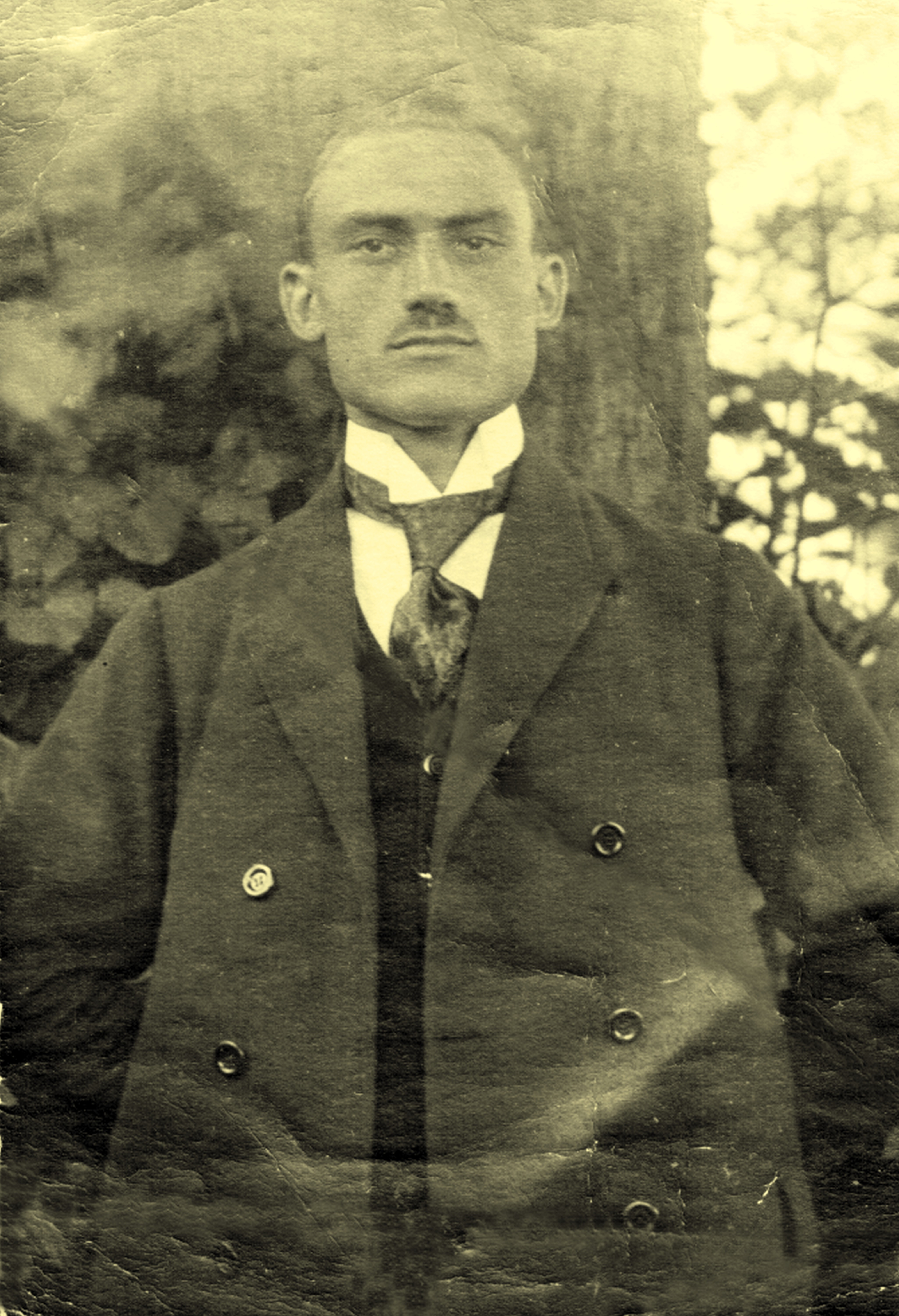 Stanisław Krzyżowski w 1925 - redaktor „Gazety Śląskiej” i dyrektor Banku Ludowego w Pszczynie